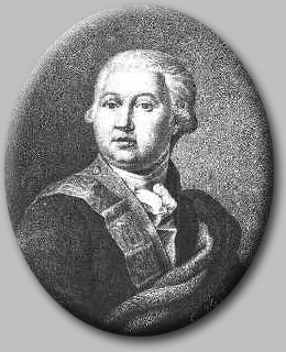 Неизвестный художник. Портрет графа Валентина Платоновича Мусина-Пушкина (1735—1804).